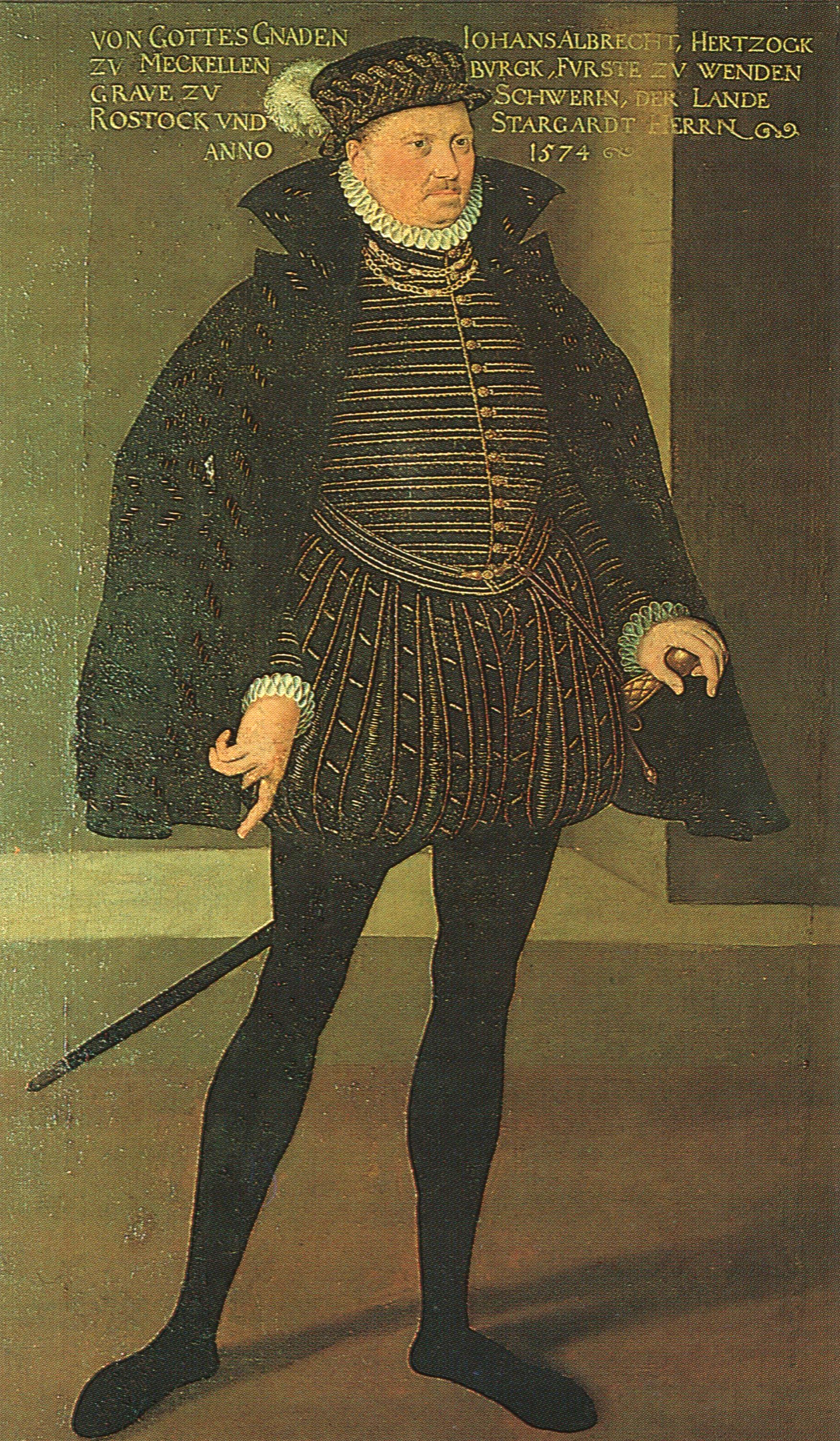 Johann Albrecht, duke of Mecklenburg (1525-1576)